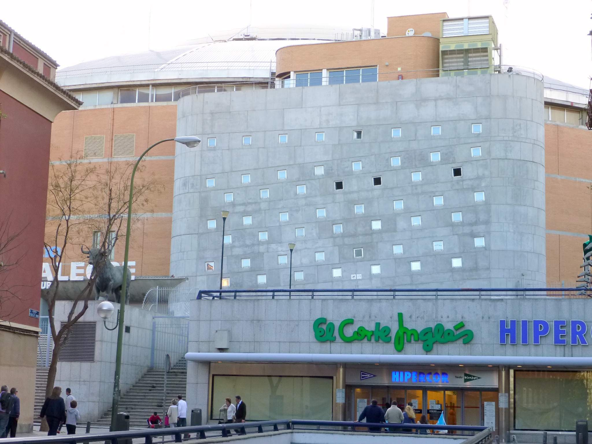 Palacio de Vistalegre (Carabanchel, Madrid)